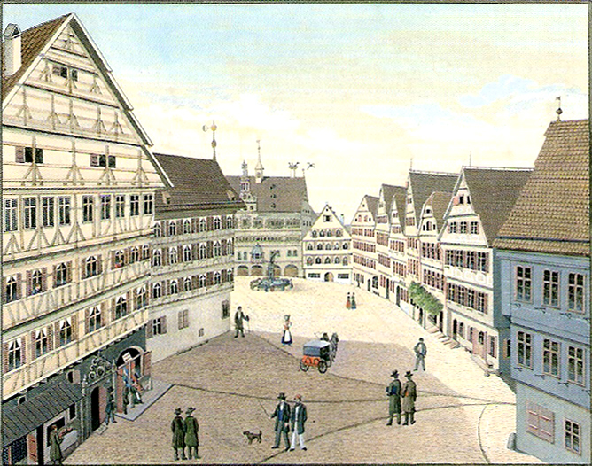 Tübingen. "Marktplatz mit Kirchgasse 1825" (Gouache 23,5 x 29,3, Träger 29,5 x 36 cm); Schefold 9493. Erschienen in „Tübinger Blätter“ 1899, S. 23.